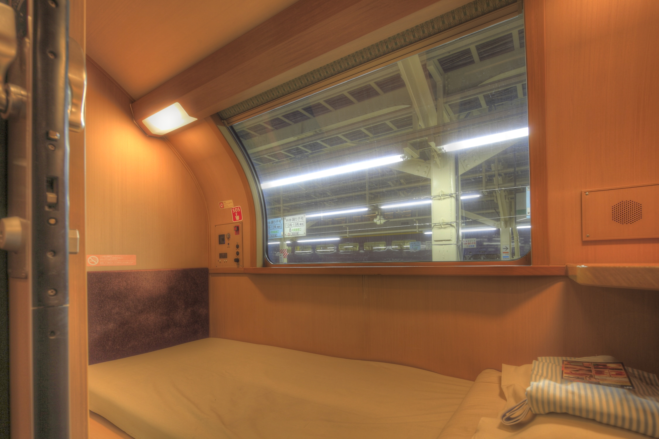 JR285系「サンライズエクスプレス」B個室寝台「シングル」室内 東京駅にて